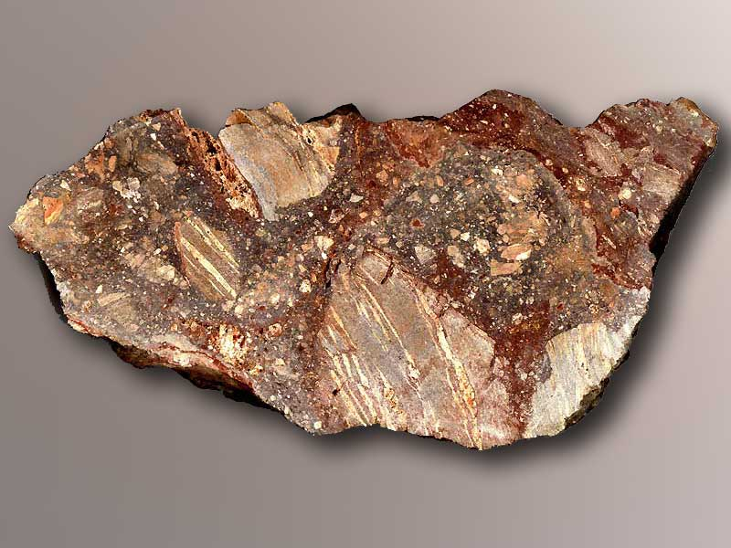 Fragment de brèche d'impactite du cratère d'impact de Rochechouart (France). Brèche à forte fusion, type La Valette La Valette est un lieu-dit situé dans la proximité immédiate du centre de l'impact. Cet échantillon montre une matrice vitreuse (rouge) dans laquelle se sont mélangés des morceaux de roche de tailles variées. Par rapport aux brèches de Babaudus, plus proches du centre de l'impact, la matrice vitreuse est bien plus ténue et les fragments de roche sont plus gros. Dimensions 105 x 230 mm